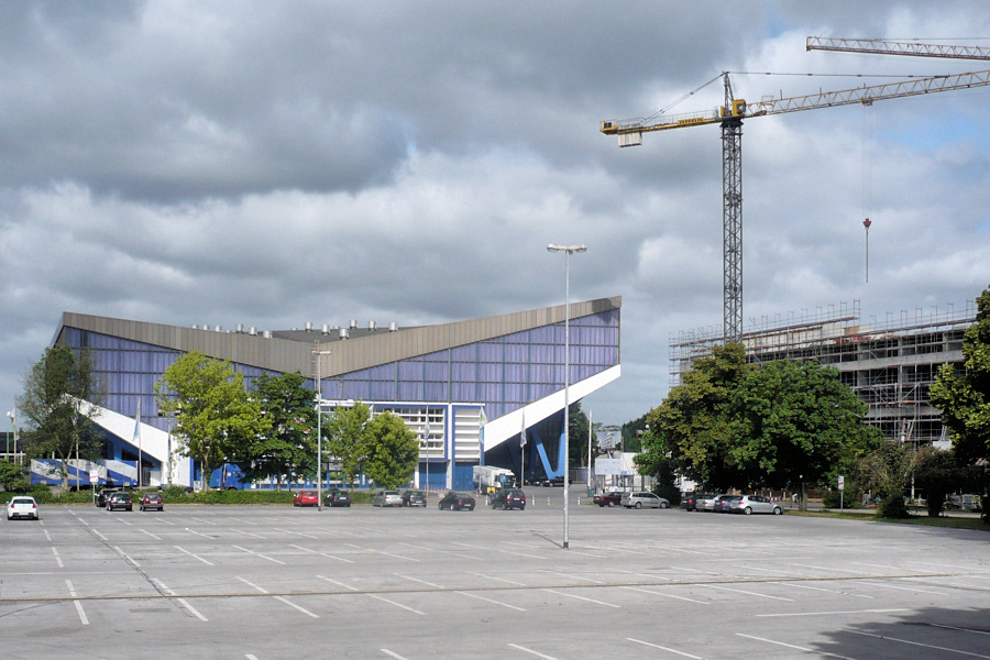 Grugahalle und im Bau befindliches Messehotel